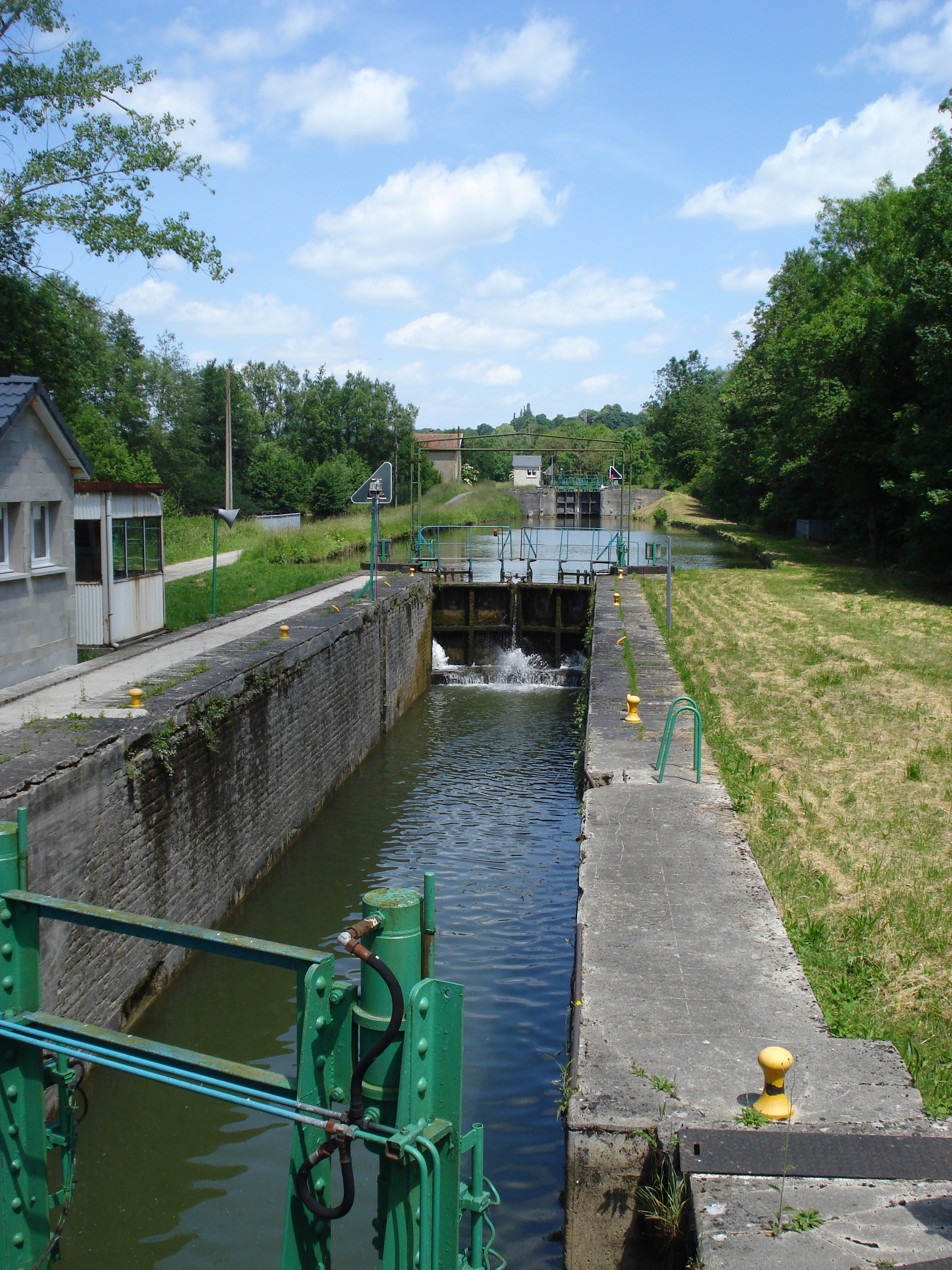 Montgon, (Ardennes, Fr) Vallée_des_écluses: two canal locks of the Canal des Ardennes.